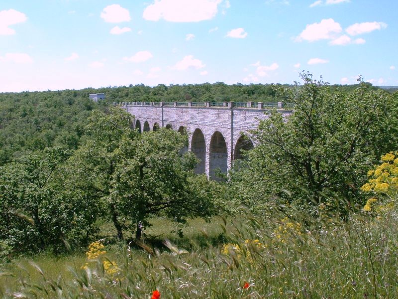 Apúliai vízvezeték